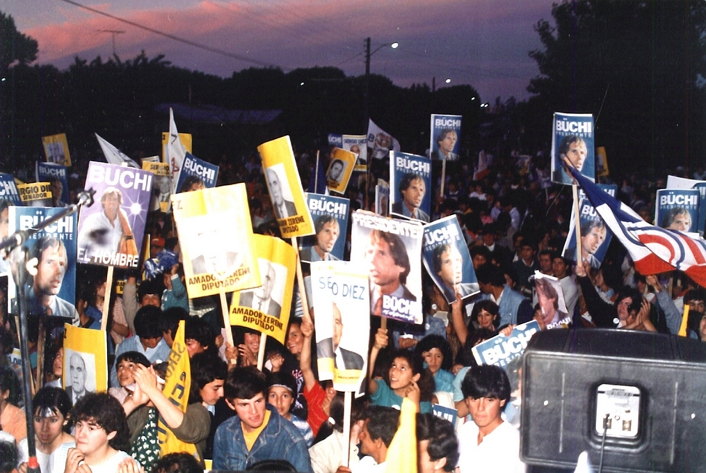 Sergio Diez, campaña política para senador.